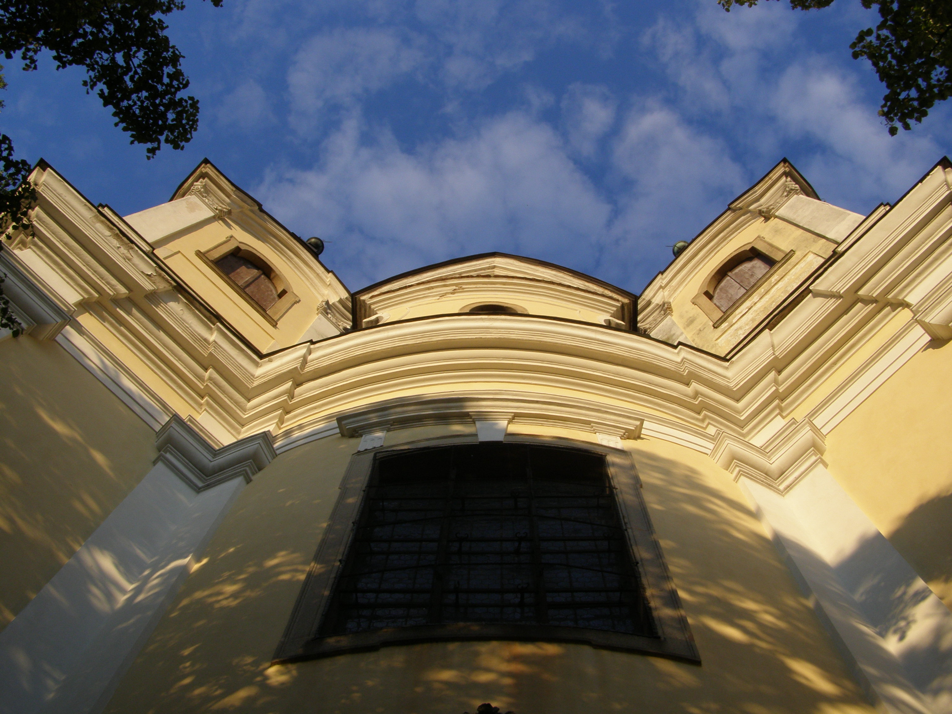 Kvasice, farní kostel Nanebevzetí Panny Marie